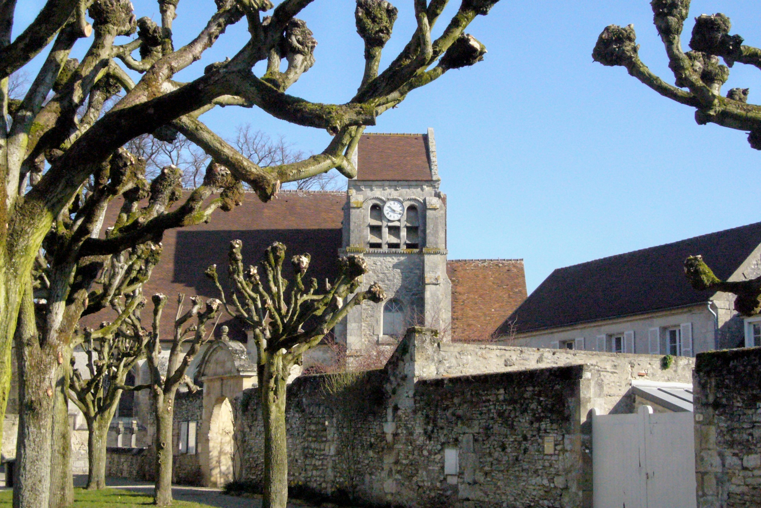 L'église de Raray depuis le sud, avec à droite, l'ancien presbytère (l'actuelle mairie).